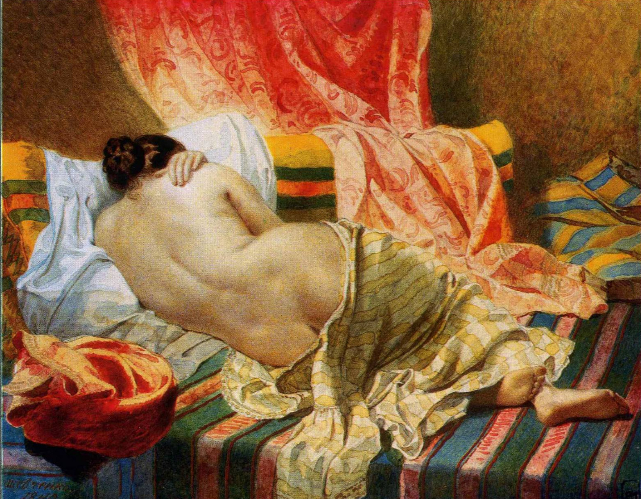 Т. Г. Шевченко. «Натурщиця». 1830—1847. Акварель, бронза. Національний музей Тараса Шевченка, Київ, Україна.